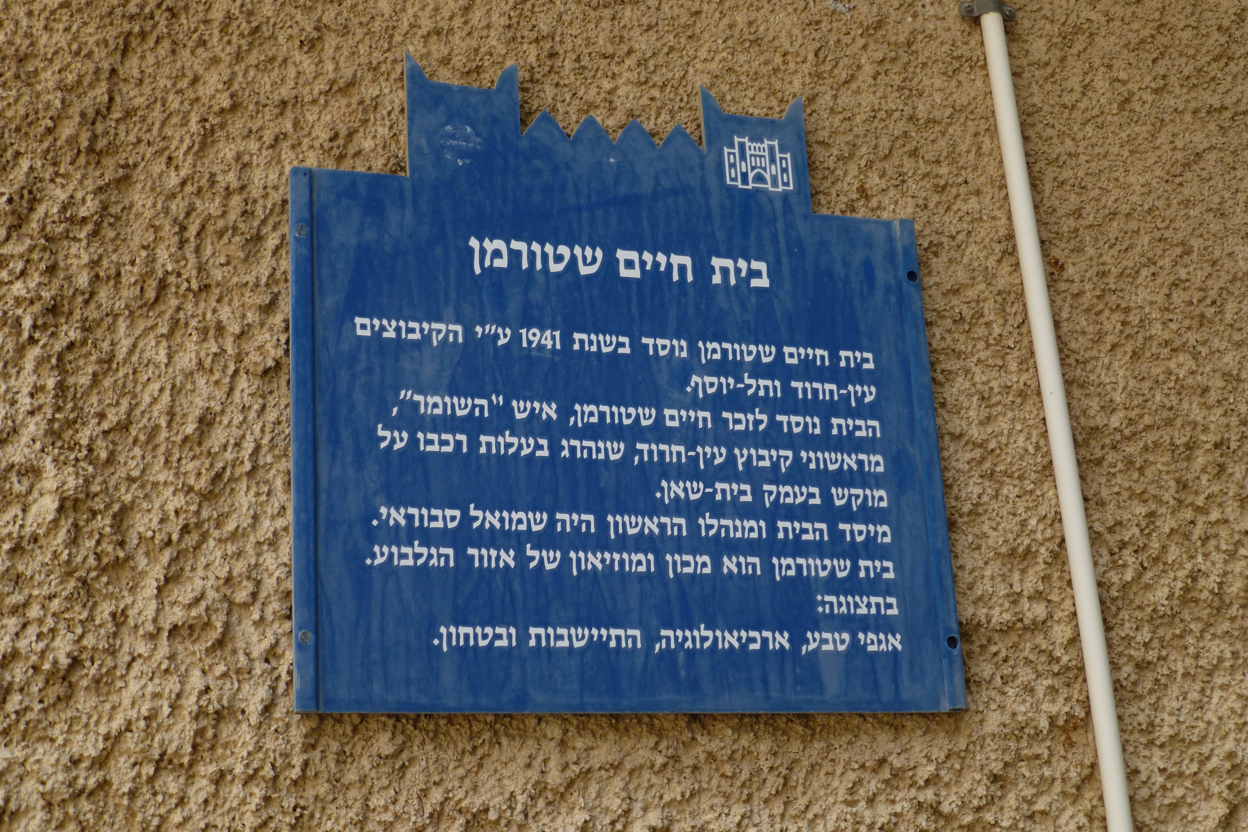 מוזיאון בית שטורמן המצוי בקיבוץ עין חרוד מאוחד נוסד בשנת 1941 על ידי חבר הקיבוץ שמואל סבוראי כמוזיאון לטבע.